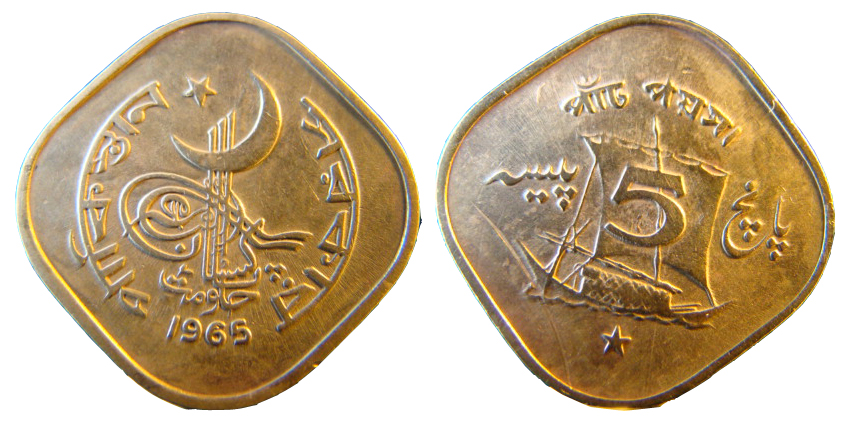 5 paise 1965 (Pakistan coin)